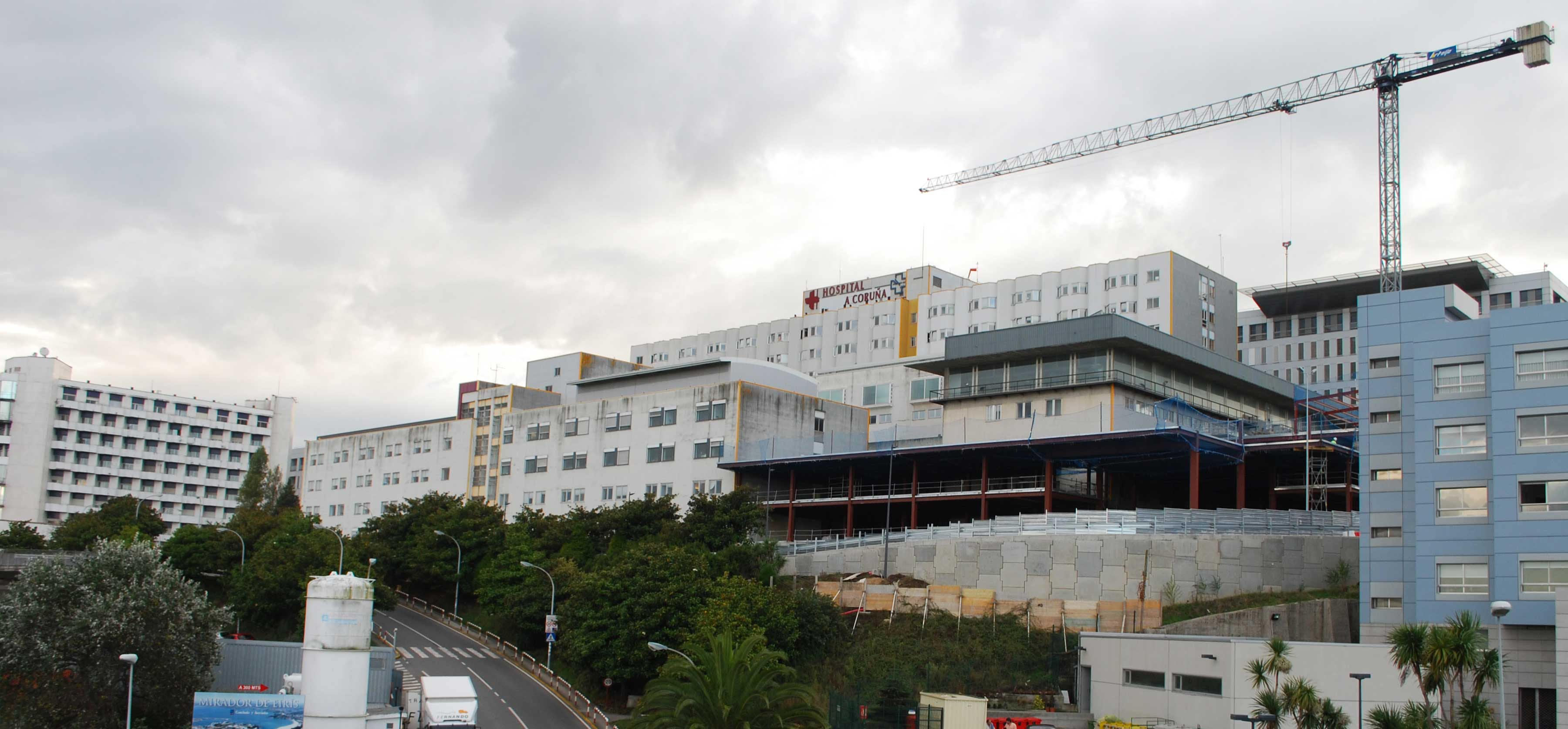 Hospital A Coruña (CHUAC) vista xeral